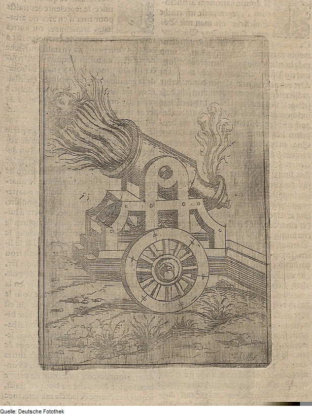 Original image description from the Deutsche Fotothek Kriegskunde & Pyrotechnik & Geschütz